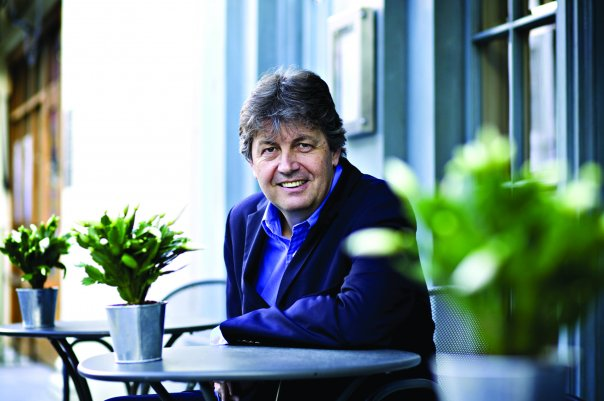 Gerhard Zeiler neues Bild